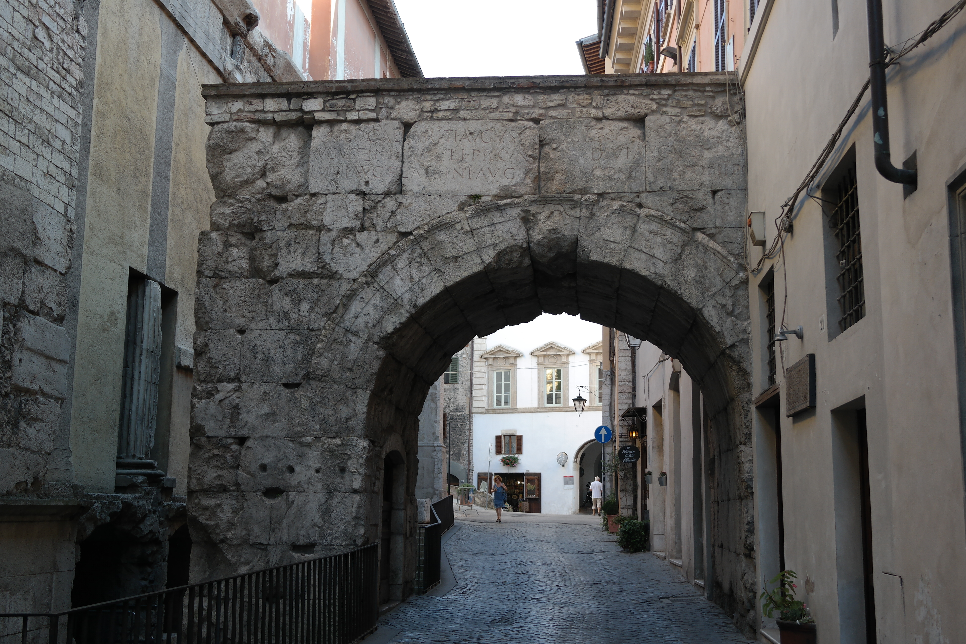 Arco di Druso e Germanico a Spoleto